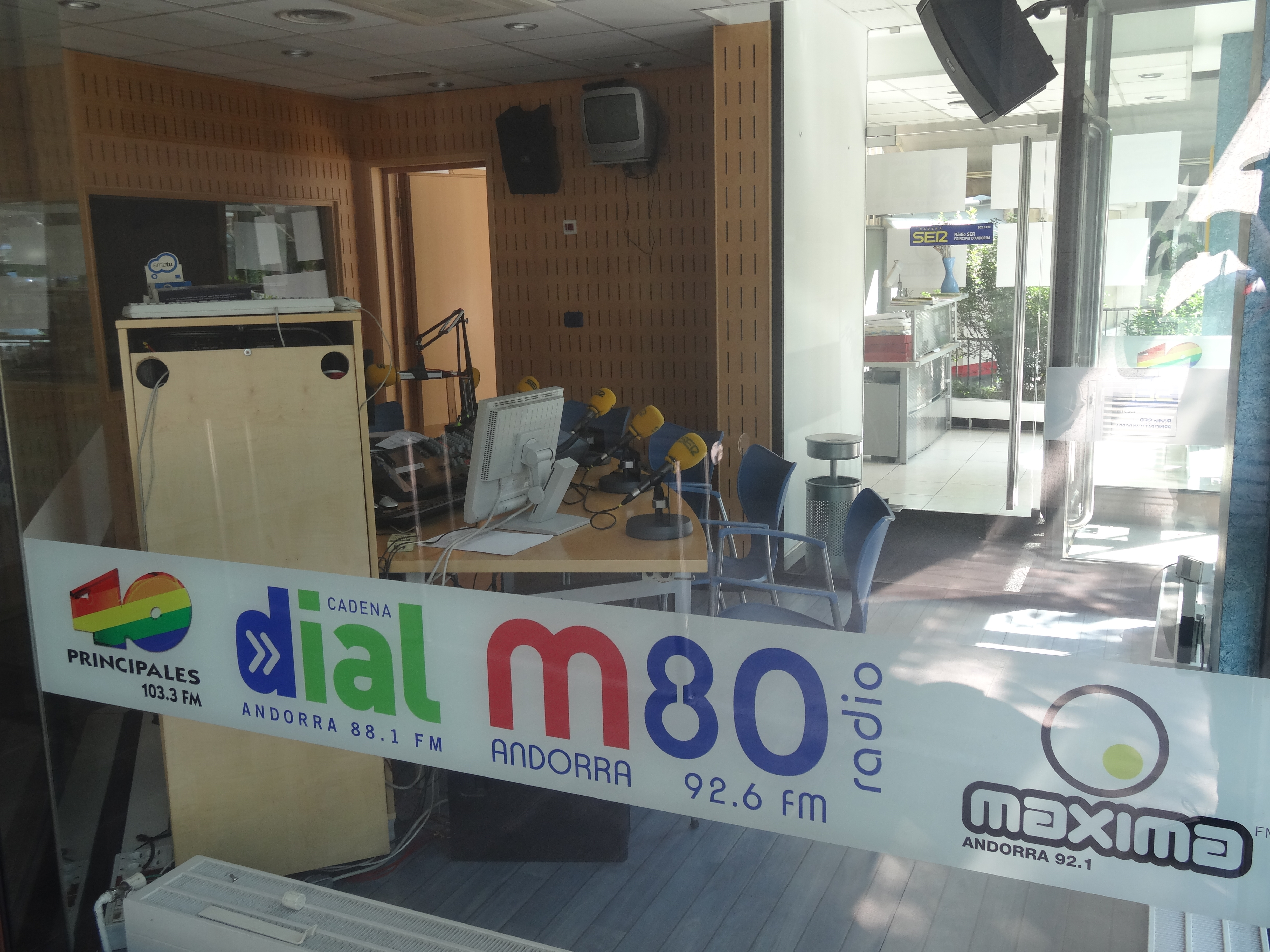 Andorra la Vella. Estudis d'Andorra Radio - 40 principales - Cadena Dial - m80